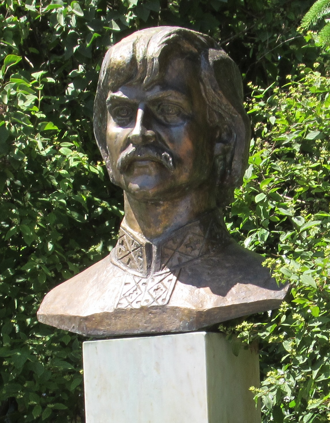 Бюст Ивана Миколайчука в родном селе Чертория (Черновицкой области)